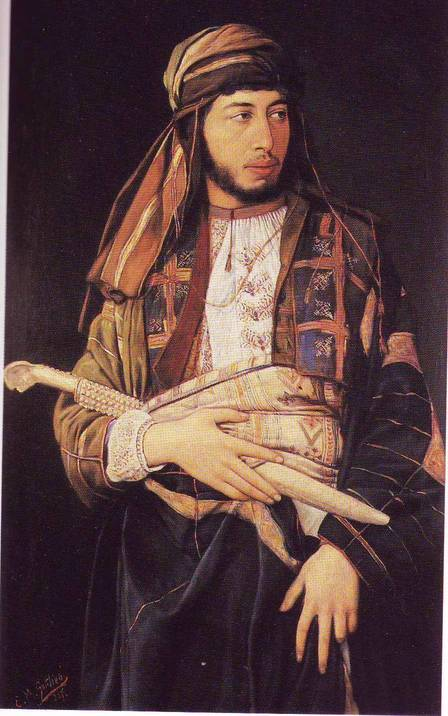 Self-Portrait in Arab Dress